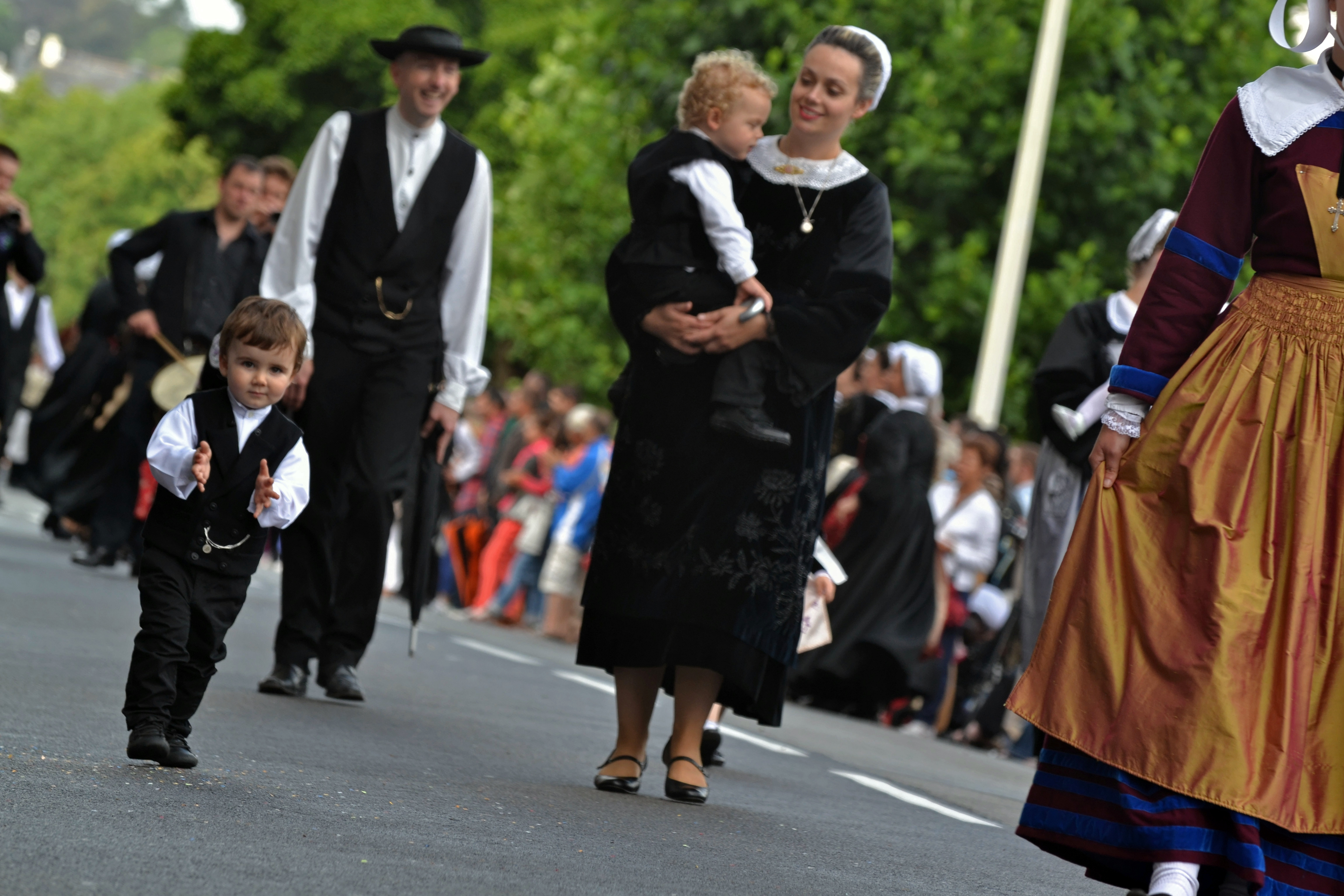 "Défilé en fête". Cercle Brug ar Menez (Spézet) lors du festival de Cornouaille 2013 le dimanche 28 juillet pour Kemper en Fête dans les rues de Quimper.